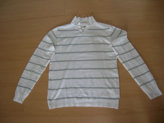 La bonneterie à Roanne